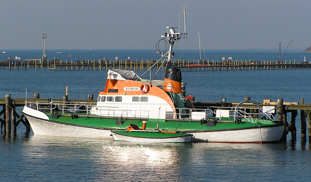 Beschreibung: SK Hamburg im Stralsunder Hafen nahe der Ziegelgrabenbrücke mit Ersatz-Tochterboot Michel (ursprünglich Rettungsboot vom Feuerschiff Borkumriff) an der Seite Weitere Ansichten, siehe auch: Fotograf: Darkone, 1. Januar 2005